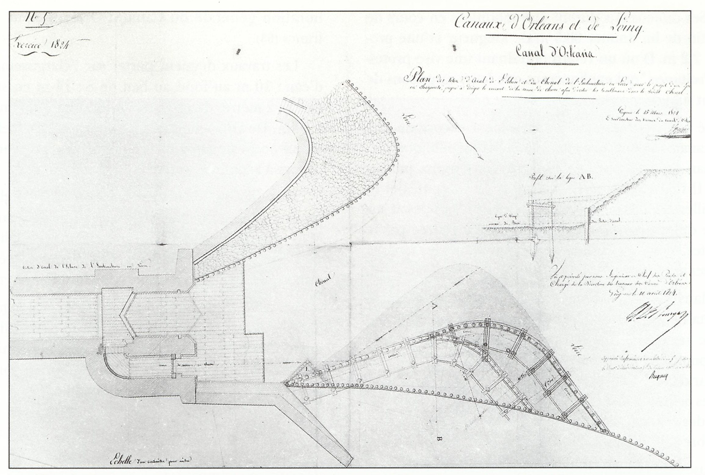 Canal d'Orléans - Plan de l'écluse de la Patache - commune de Combleux